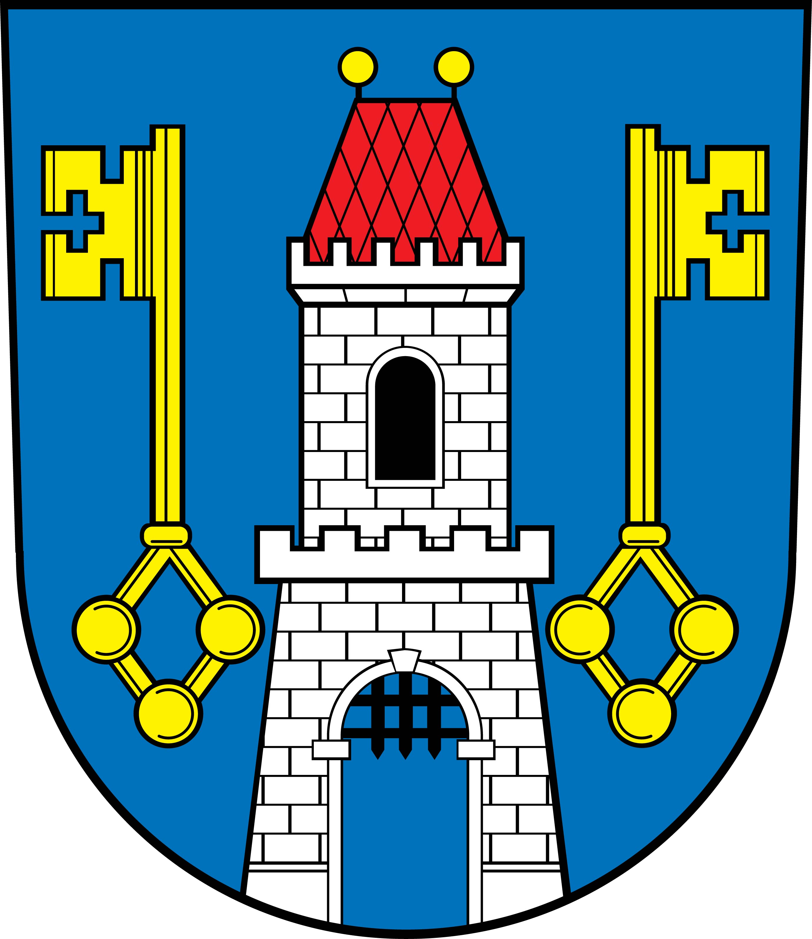 znak městyse Načeradec.